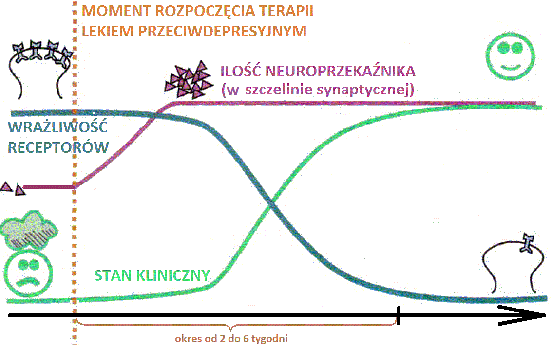 mechanizm działania leków przeciwdepresyjnych